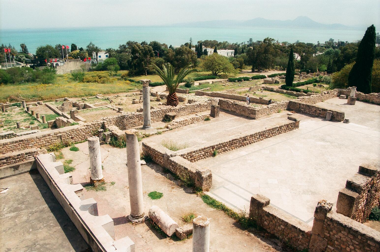 Villas romaines de Carthage